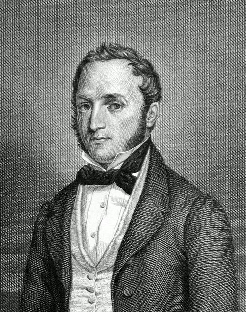 Friedrich Daniel Bassermann, German politician (1811-1855) see Friedrich Daniel Bassermann